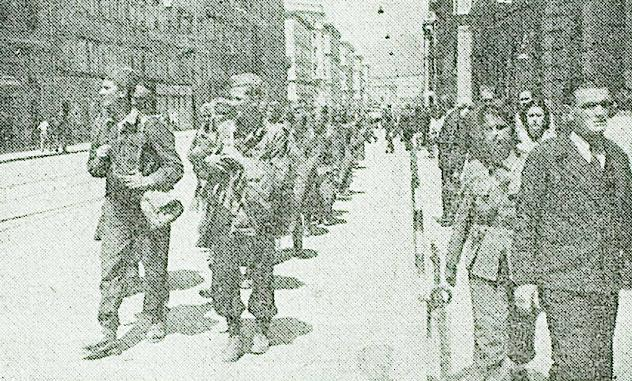 Jugoslovanska vojska na ulicah Trsta.